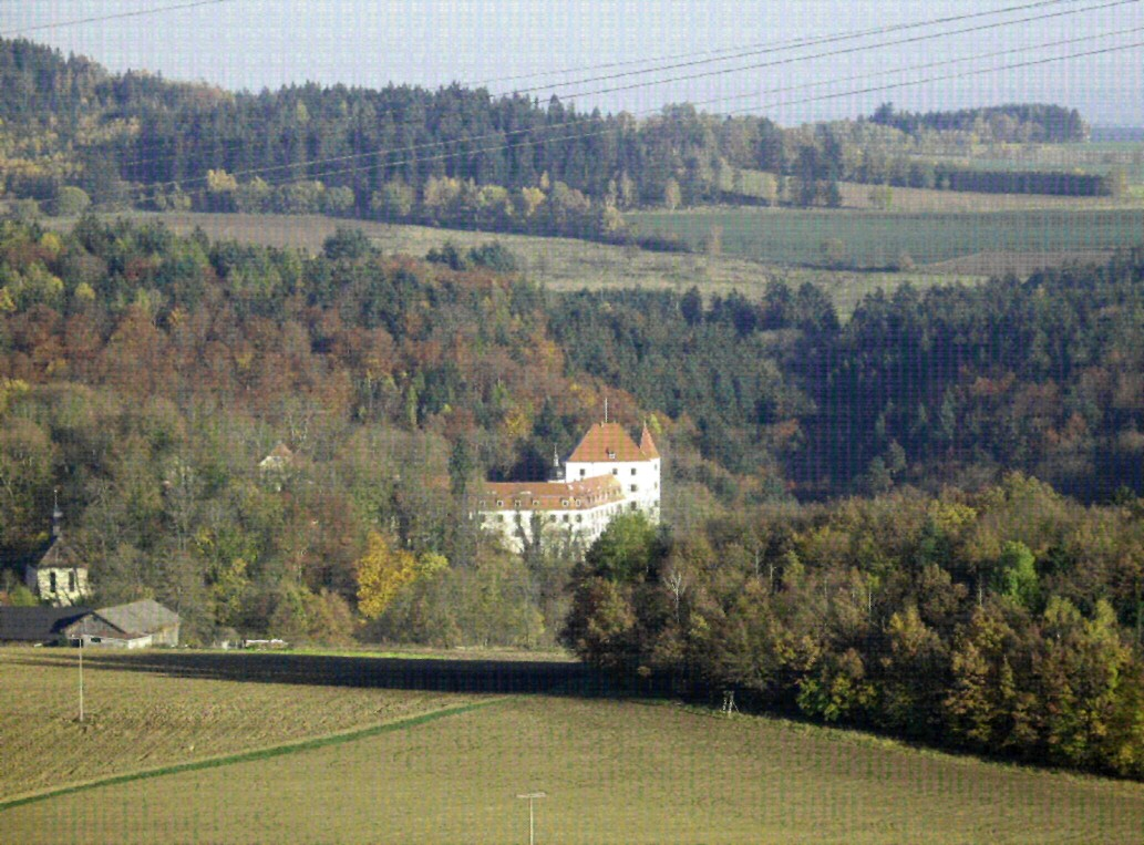 Burg Guttenberg im Landkreis Kulmbach (Oberfranken)